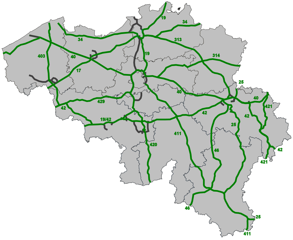 E-wegen in België, aangeduid in groen. Grijze wegen zijn de snelwegen in België die geen E-nummer dragen.